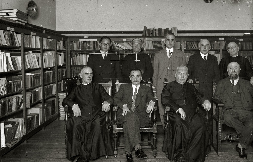 Título original: Miembros de la Academia de la Lengua Vasca y de la Federación de Entidades Euskeristas (1/3) Localización: Guipúzcoa